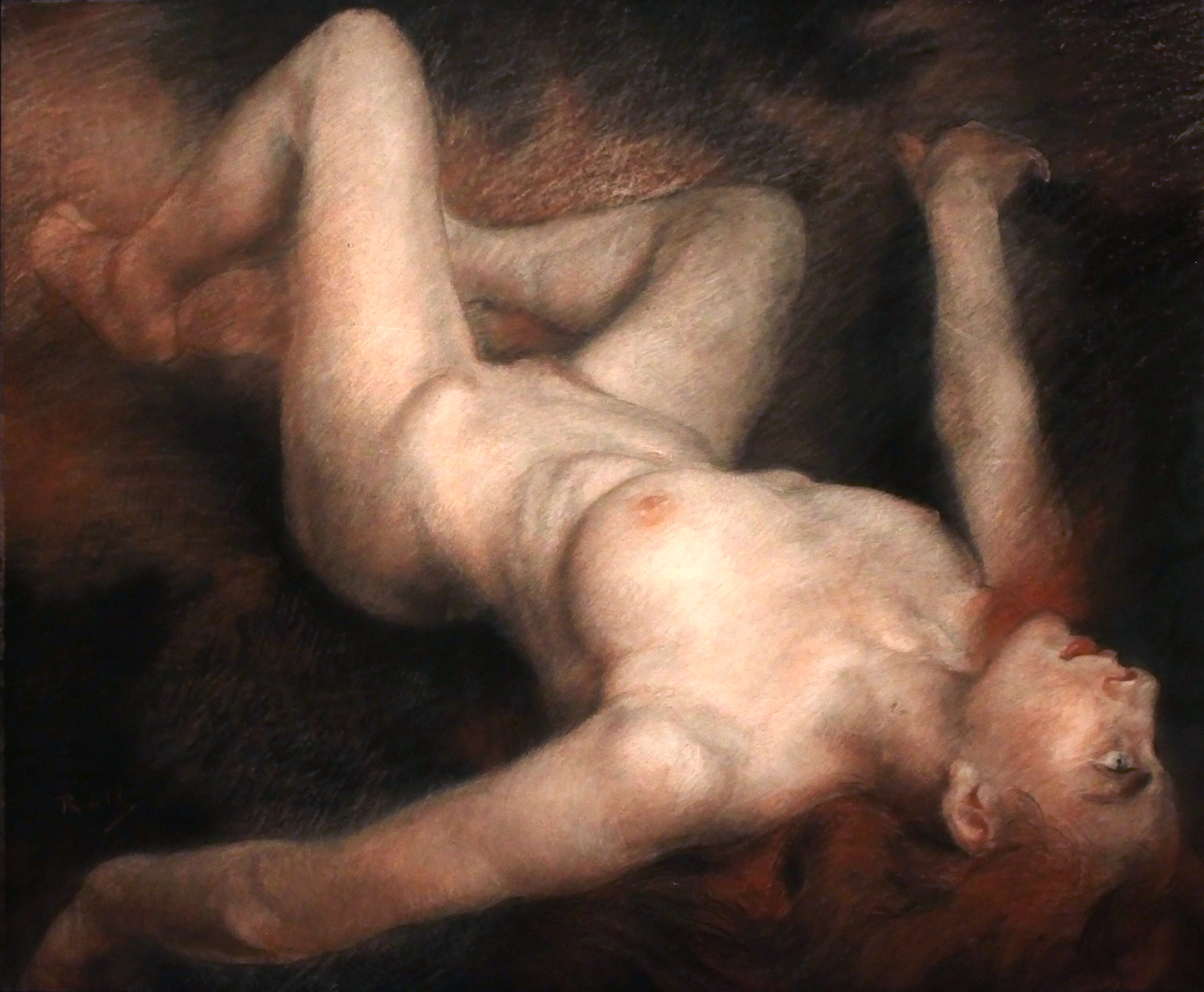 Démoniaque, crayon graphite et pastel sur papier collé sur toile, par Alfred Roll, 1904. Appartient au fond du Musée des Beaux-Arts de la Ville de Paris ( Petit Palais ), présenté dans le cadre de l'exposition "L'art du pastel de Degas à Redon", du 15 Septembre 2017 au 8 Avril 2018.